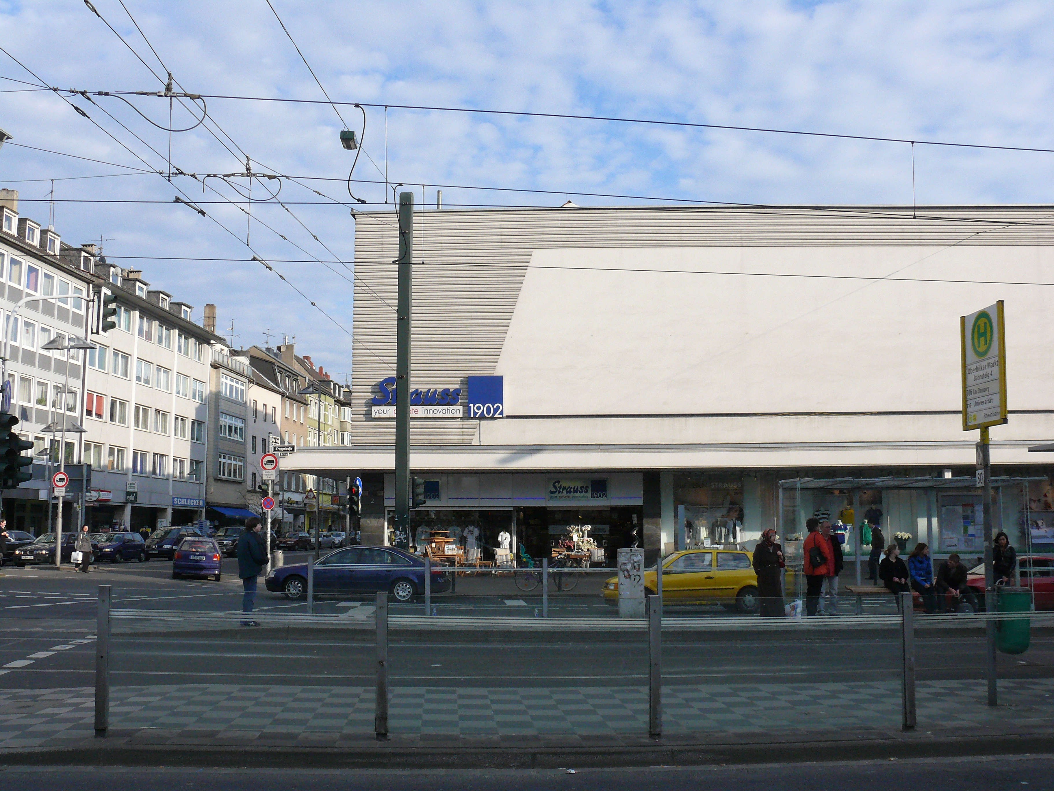 Umstieg am U-Bahnhof Oberbilker Markt (Westseite)